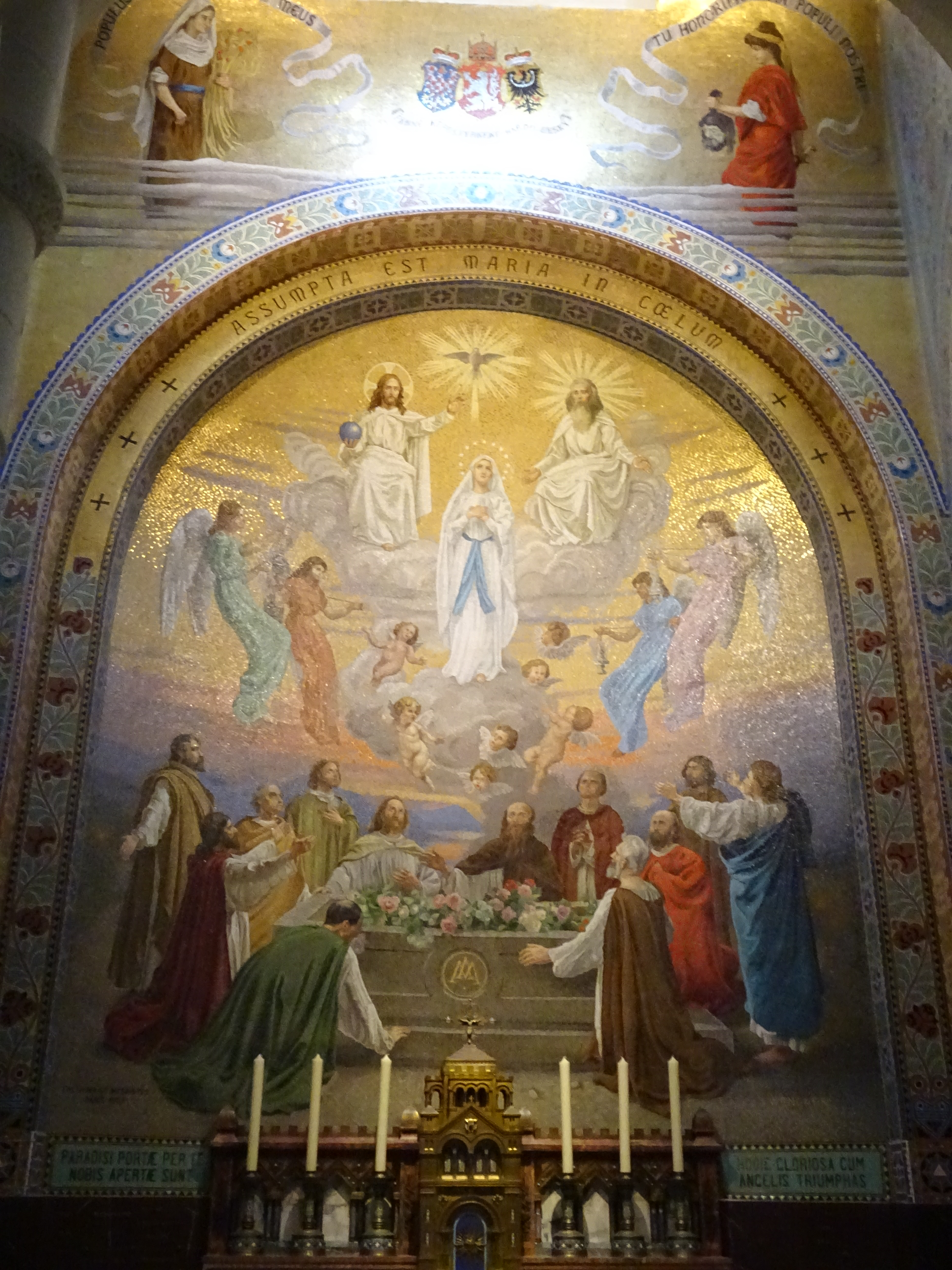 Lourdes - Basilique ND du Rosaire - Mosaïque Assomption